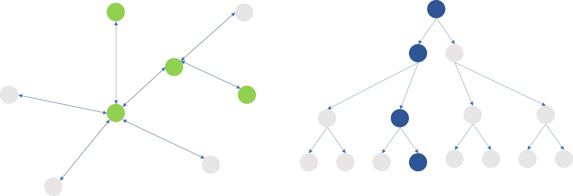 Schematische Darstellungen unterschiedlicher Datenmodelle. Die Knoten des Graphen stellen die internen Tabellen des Datenmodells und die Kanten zwischen den Knoten die Verbindungen zwischen Schlüsselfeldern der jeweiligen Tabellen dar. Links: Das assoziative Modell. Verbindungen zwischen Datenquellen sind nicht gerichtet und können von jedem Knoten über die jeweiligen Kanten zu einem anderen Knoten hergestellt werden Rechts: Das hierarchische Modell. Unterknoten sind nur vom Wurzelknoten oben zu erreichen. Verbindungen von einem Unterknoten zu einem weiteren Unterknoten gleicher hierarchischer Ebene sind nicht möglich